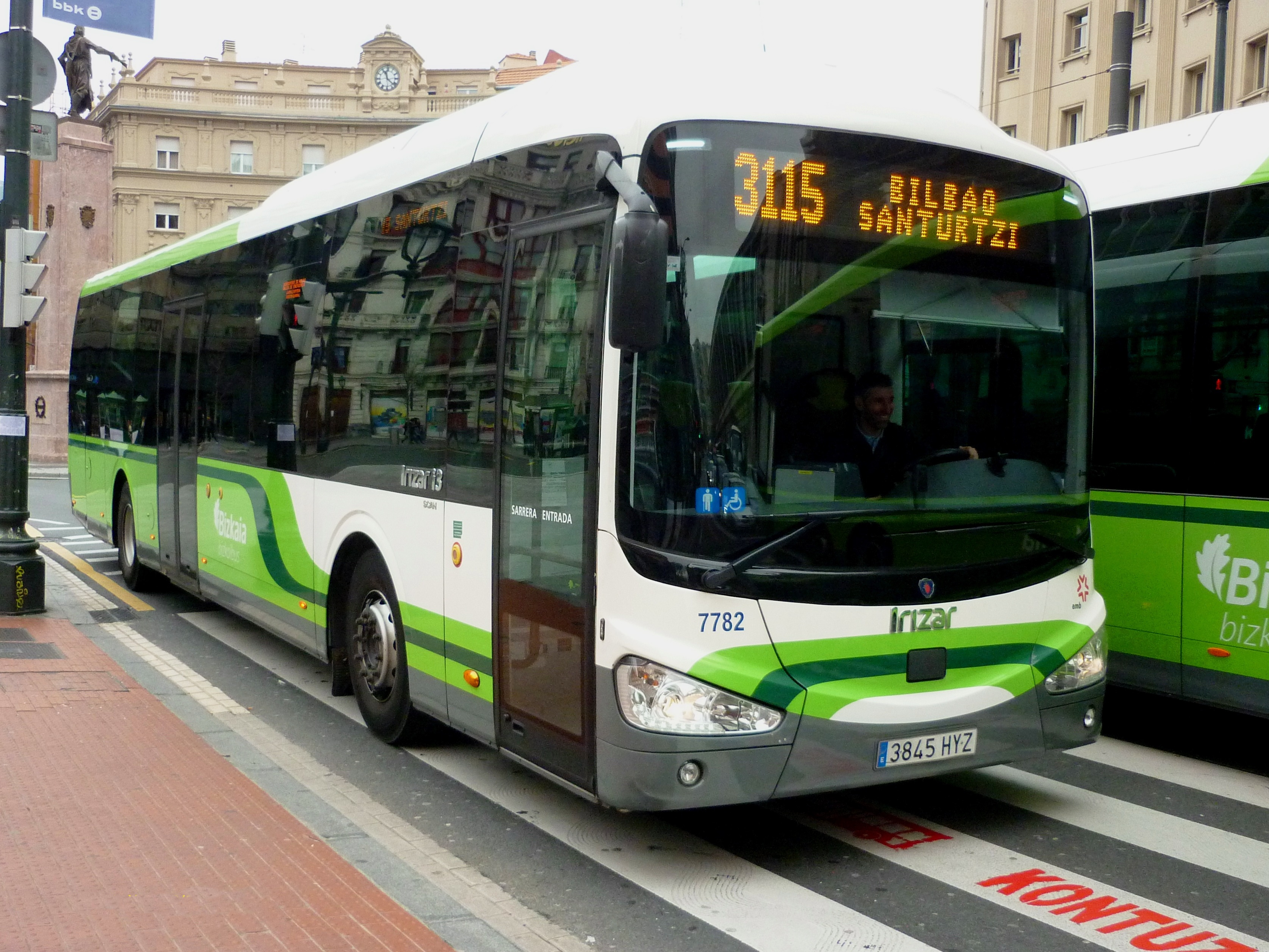 7782_EMB